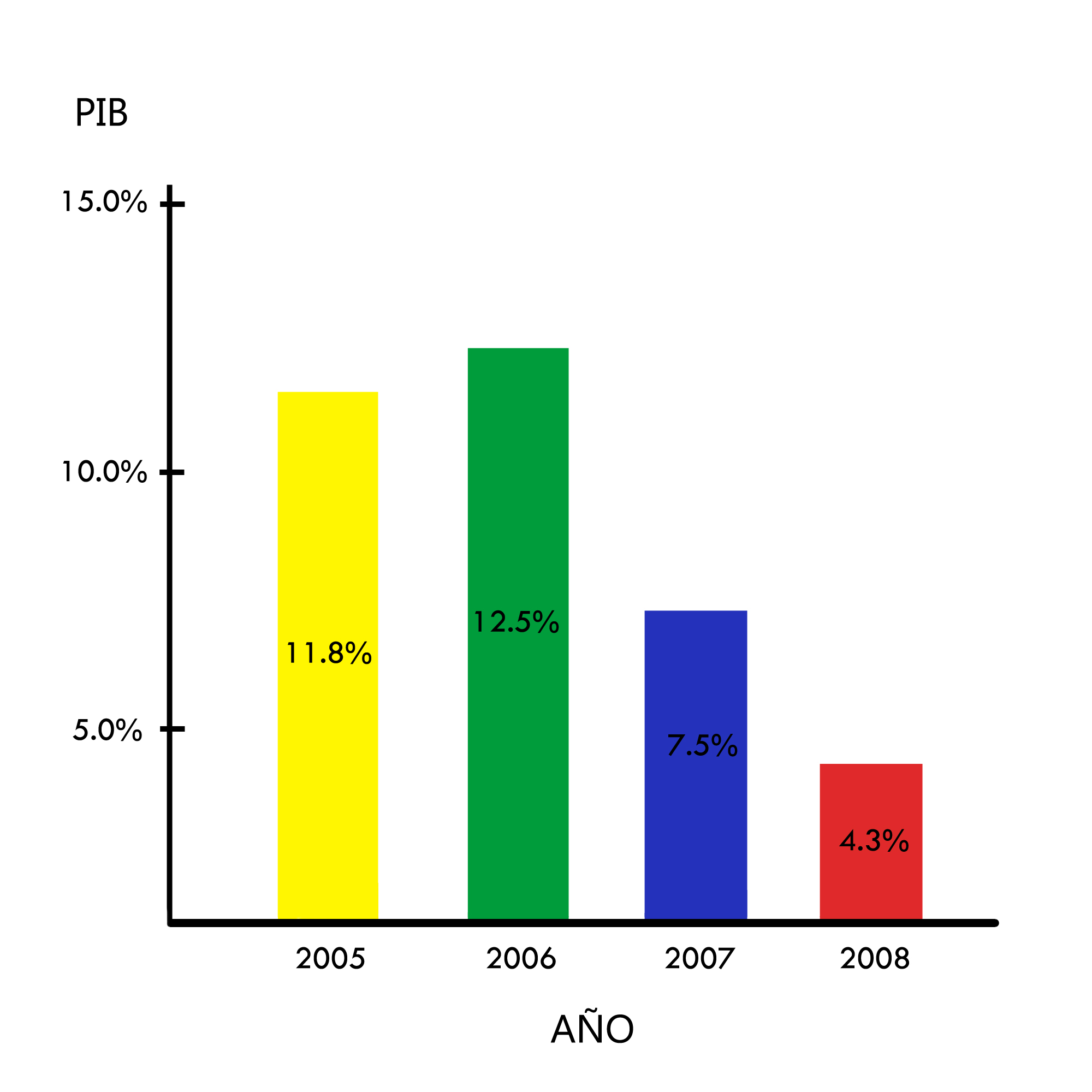 PIB-Economía de Cuba (nivel de vida)